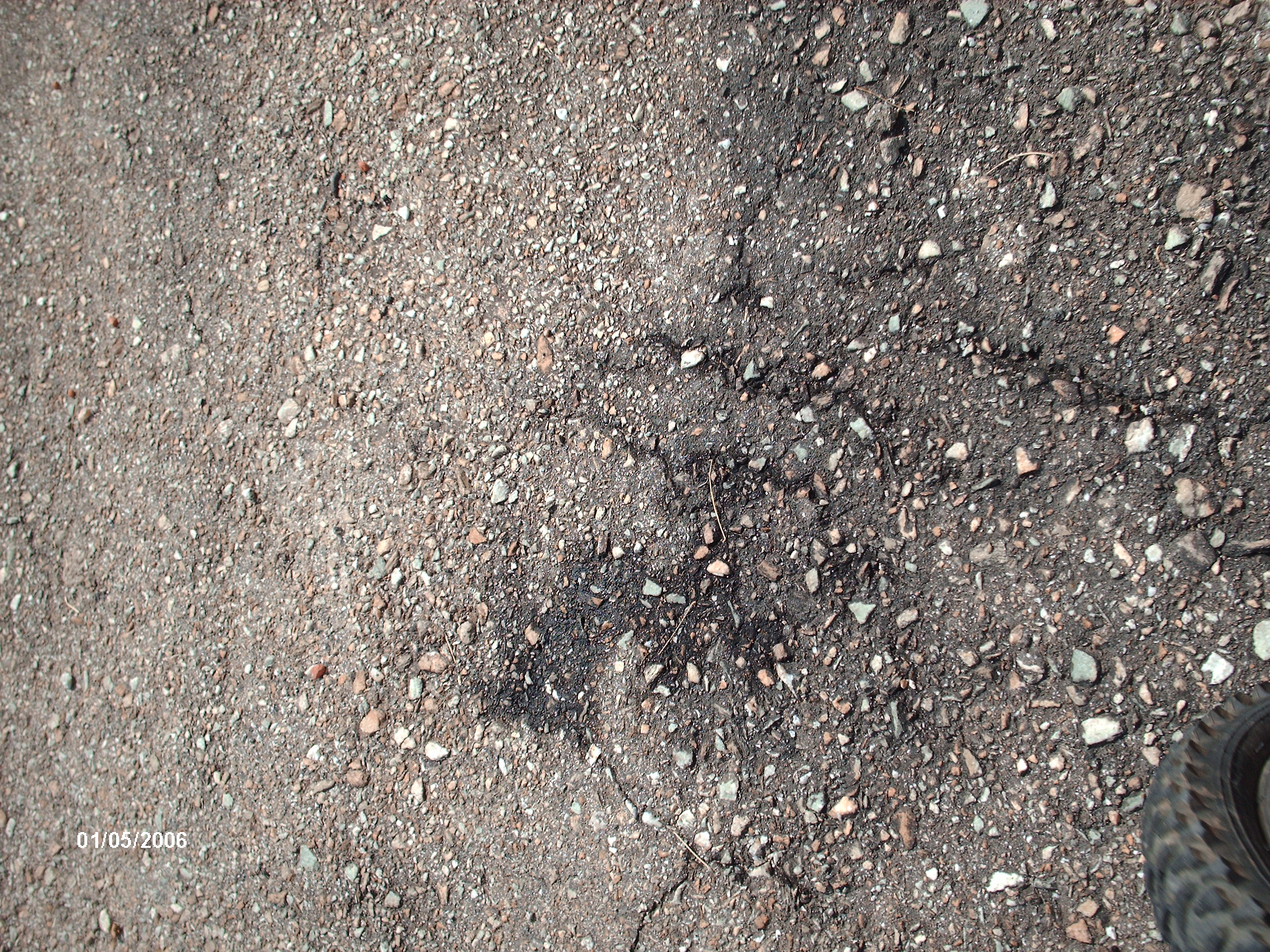 Asfalt a una carretera.